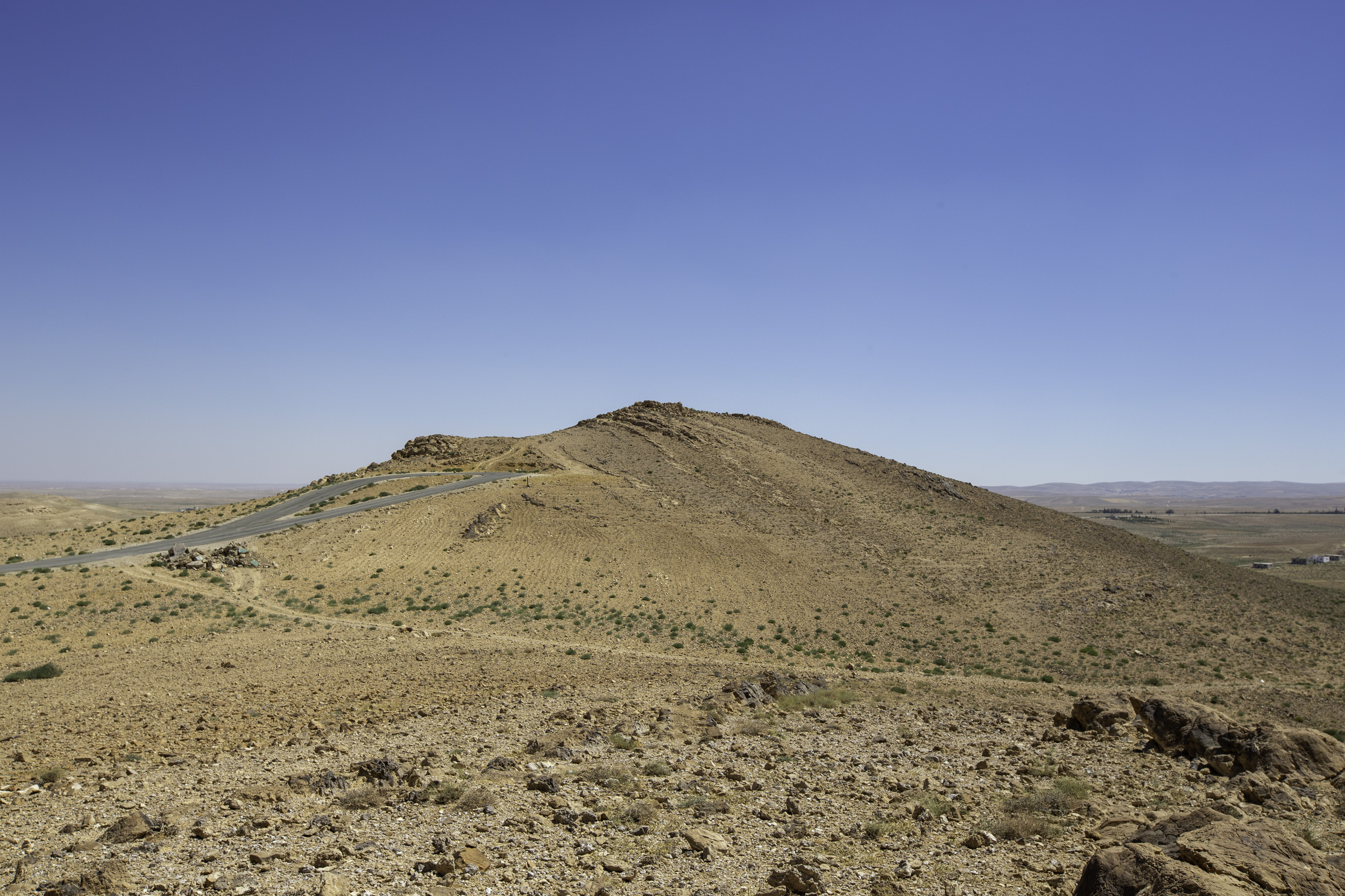 Jabal Tahkim